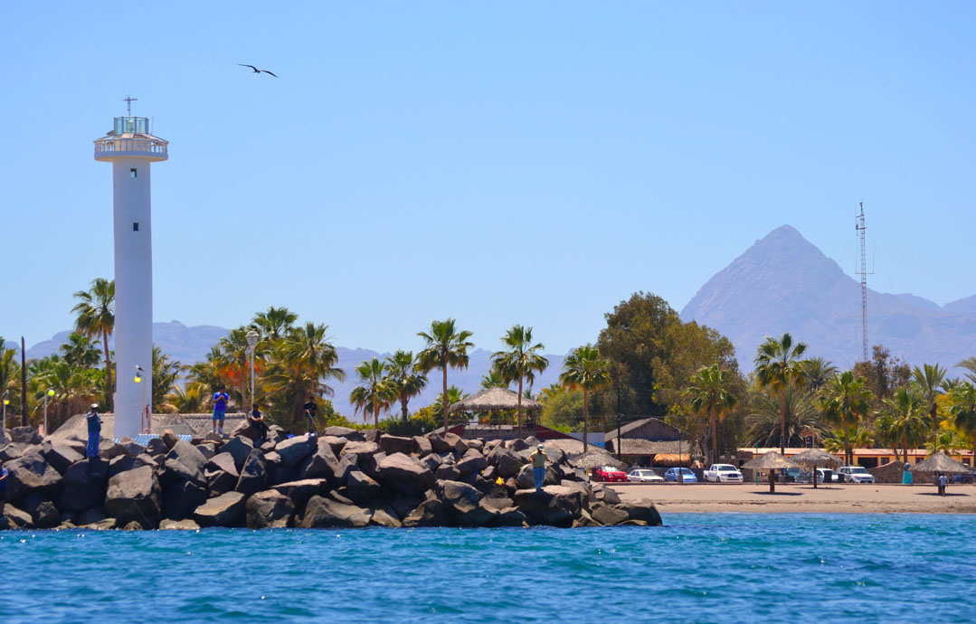 Llegando a Loreto en lancha, después de un viaje a Coronado.